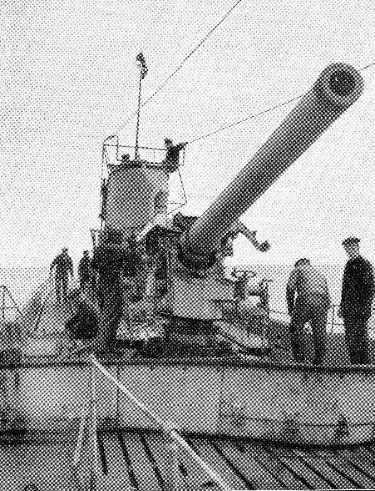 SM U 117. Vorderes Geschütz